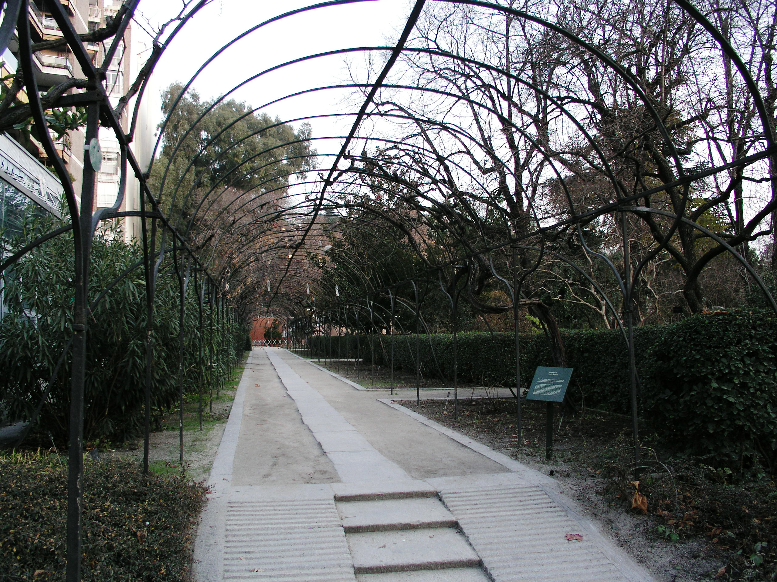 Royal Garden Botanico, Madrid, Spain. Emparrado de hierro forjado, construido en 1786